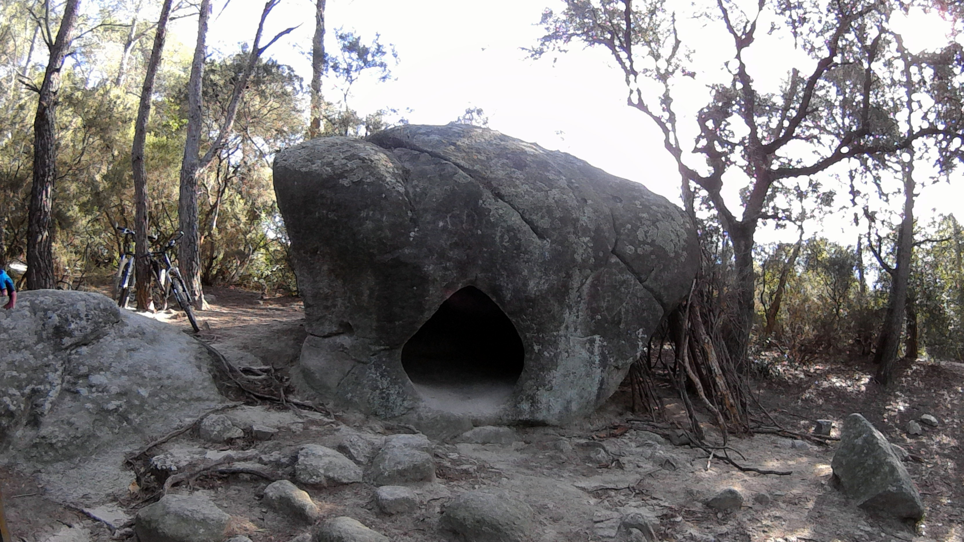 Roca Foradada de Can Gol Gran bloc granitic foradat artificialment This is a photography of a Special Area of Conservation in Spain with the ID: ES5110011. Natura2000 entry, EEA entry